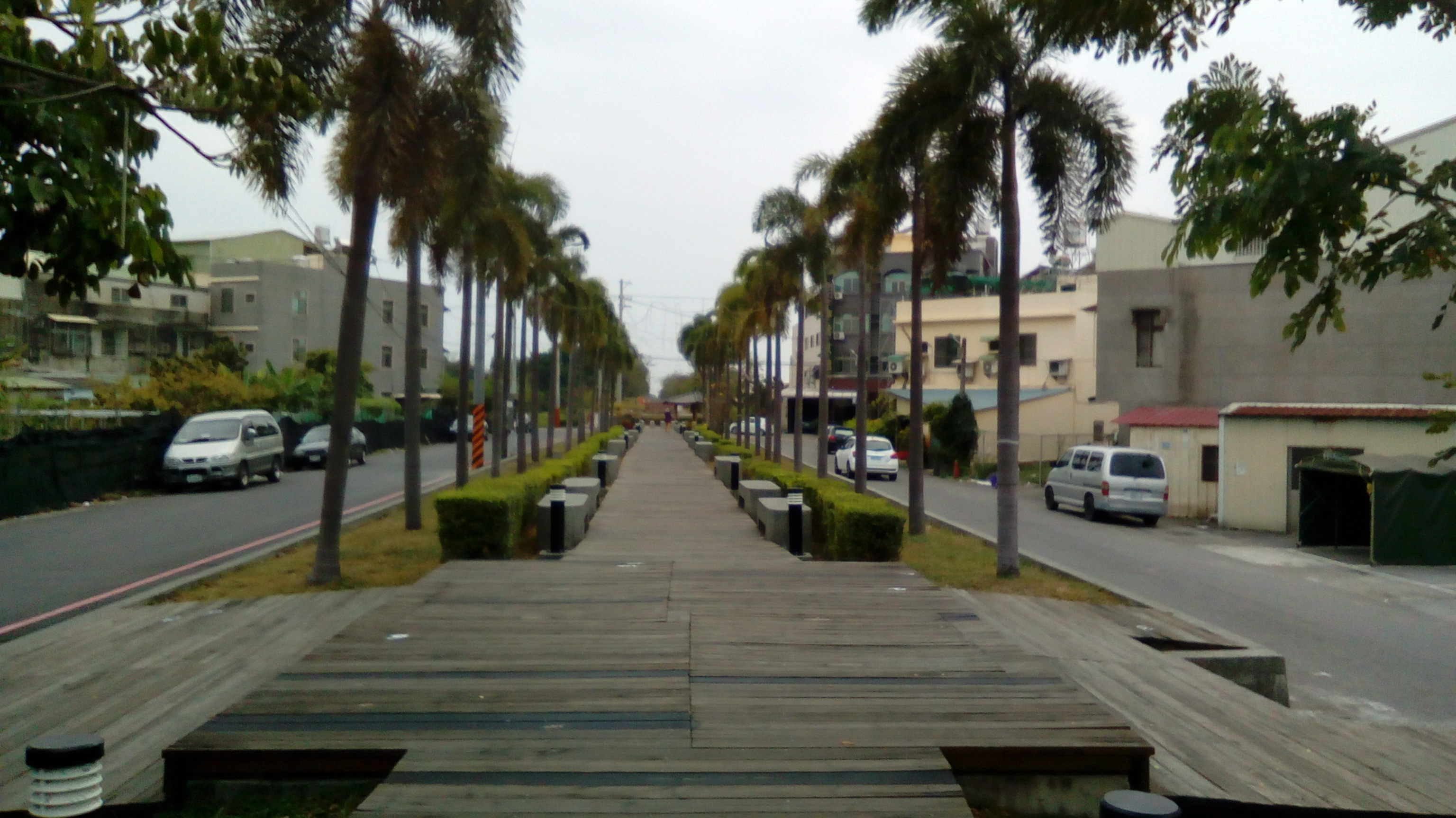 所謂「綠川」，即為嘉南大圳西港分線 原為僅有灰白兩色的溝壁 當局為美化當地景觀、提升觀光價值 特地設置木棧道、進行植栽 以促進景觀美化